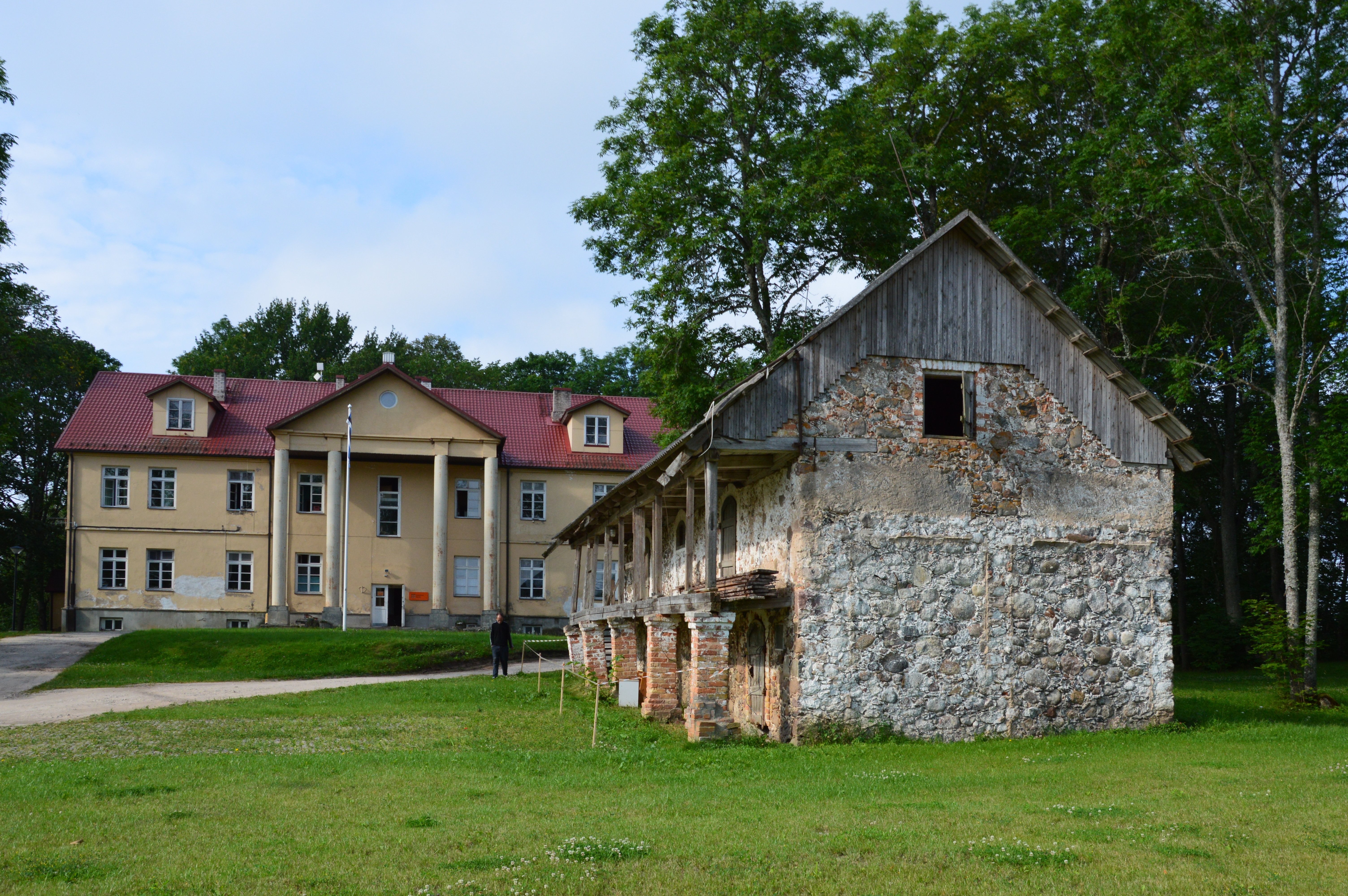 Kodijärve mõisasüda.